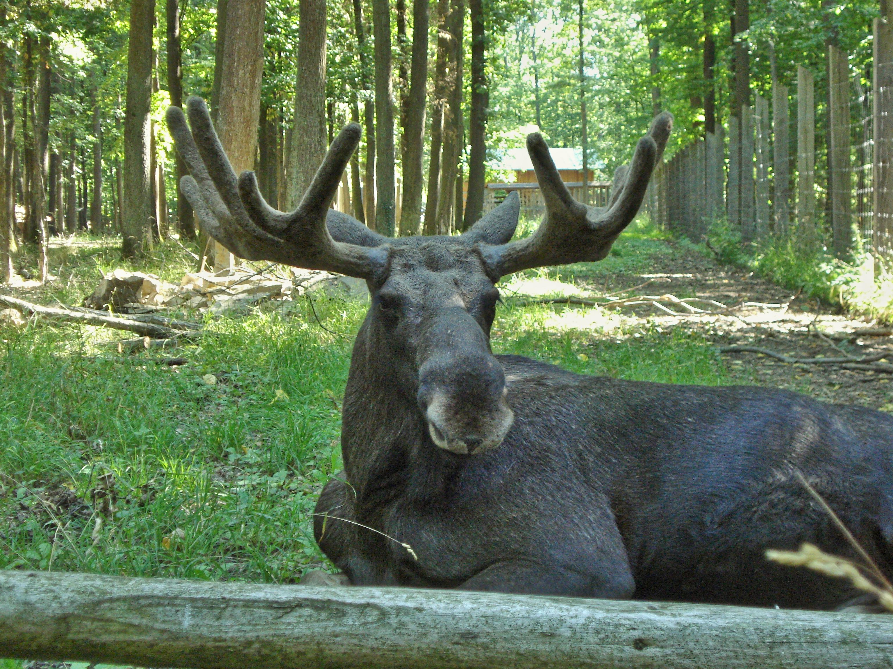 Elchgehege im Wildpark "an den Eichen", Schweinfurt, Deutschland